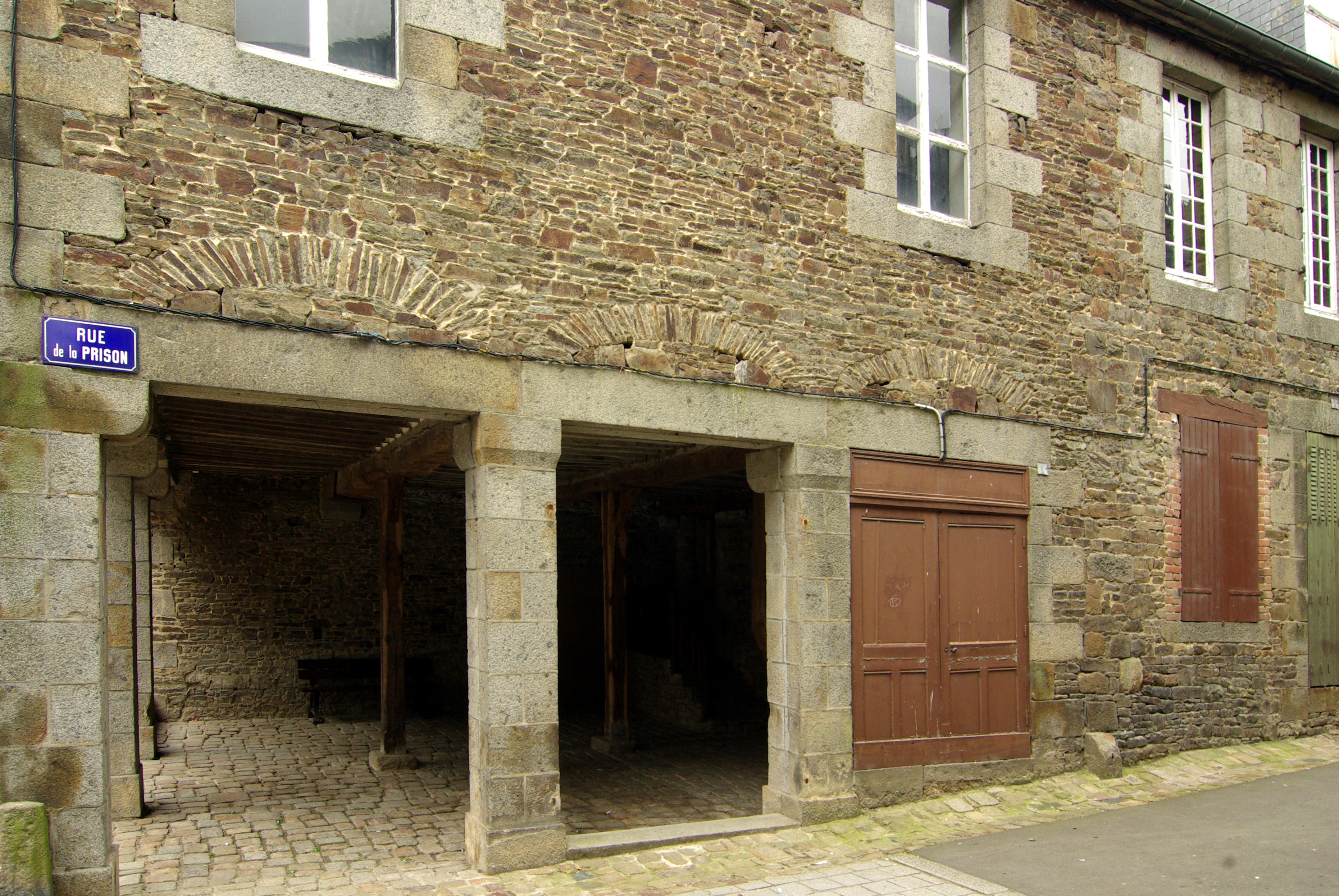 L'ancienne prison royale de Tinchebray 61